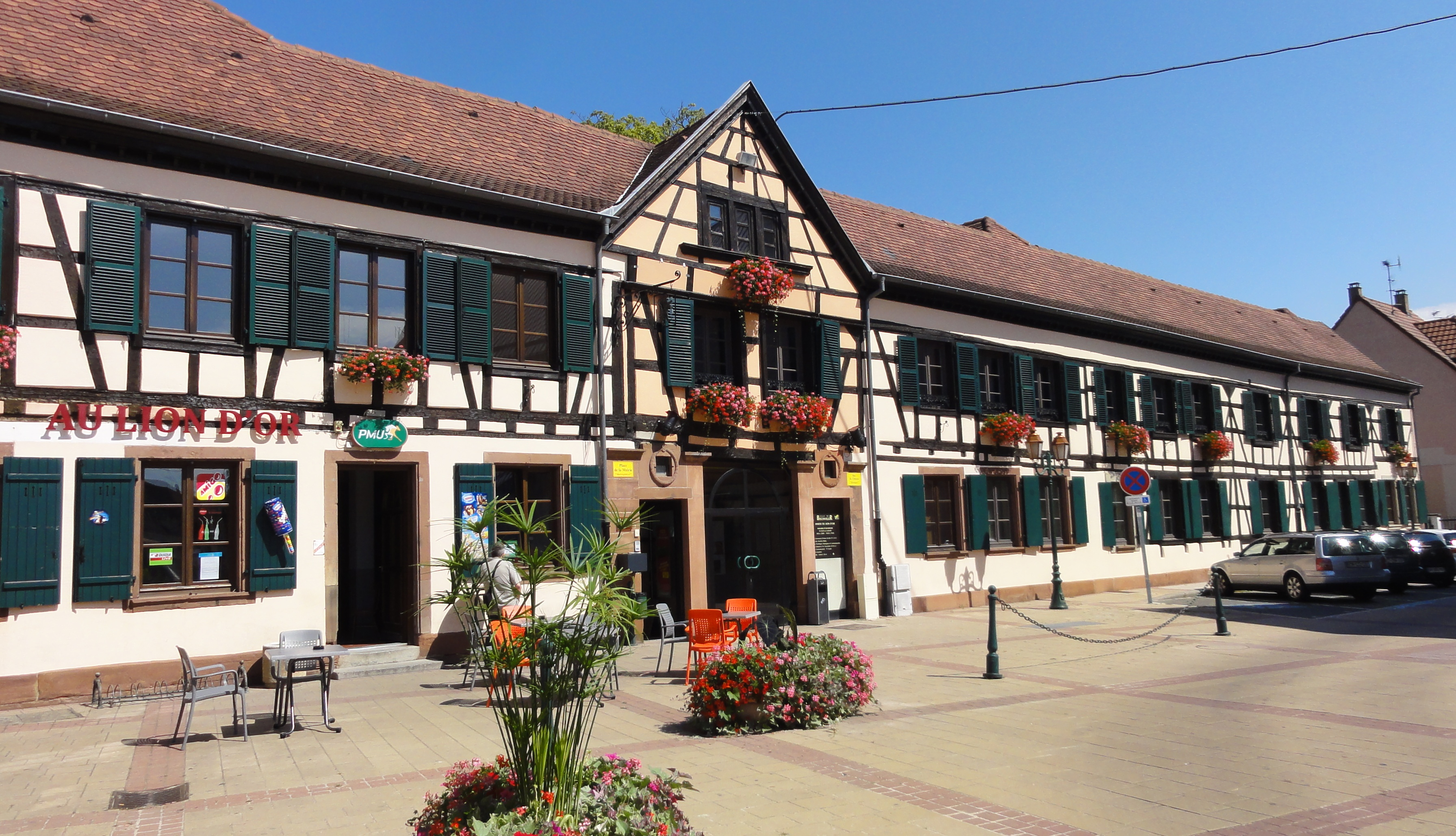 Alsace, Bas-Rhin, Bischwiller, Ancienne auberge "Au Lion d'Or" , relais de poste, aujourd'hui annexe de la mairie (XVIIe-XIXe), 1 rue du Château. .